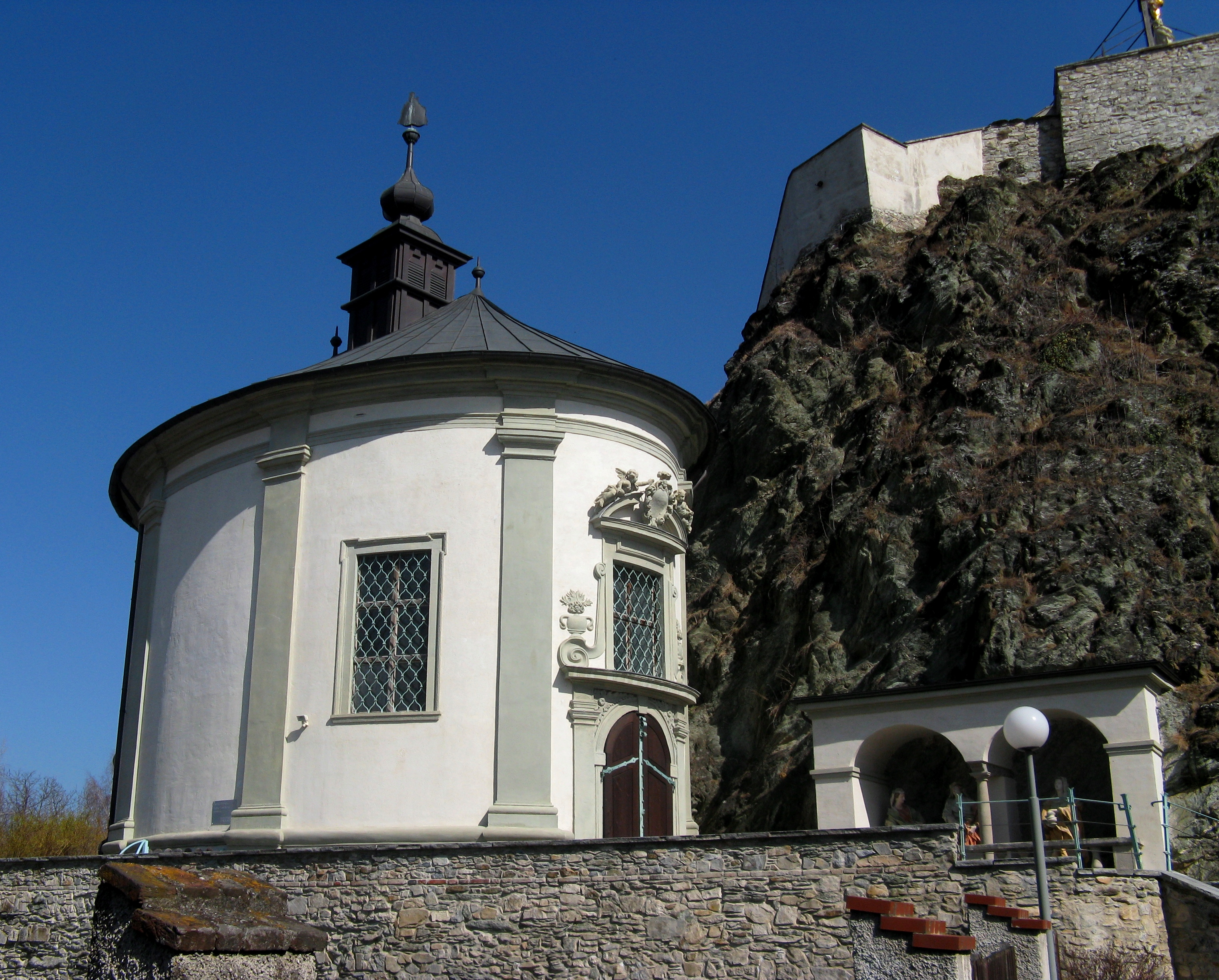 Grazer Kalvarienberg, Dismas- oder Mariatroster-Kapelle